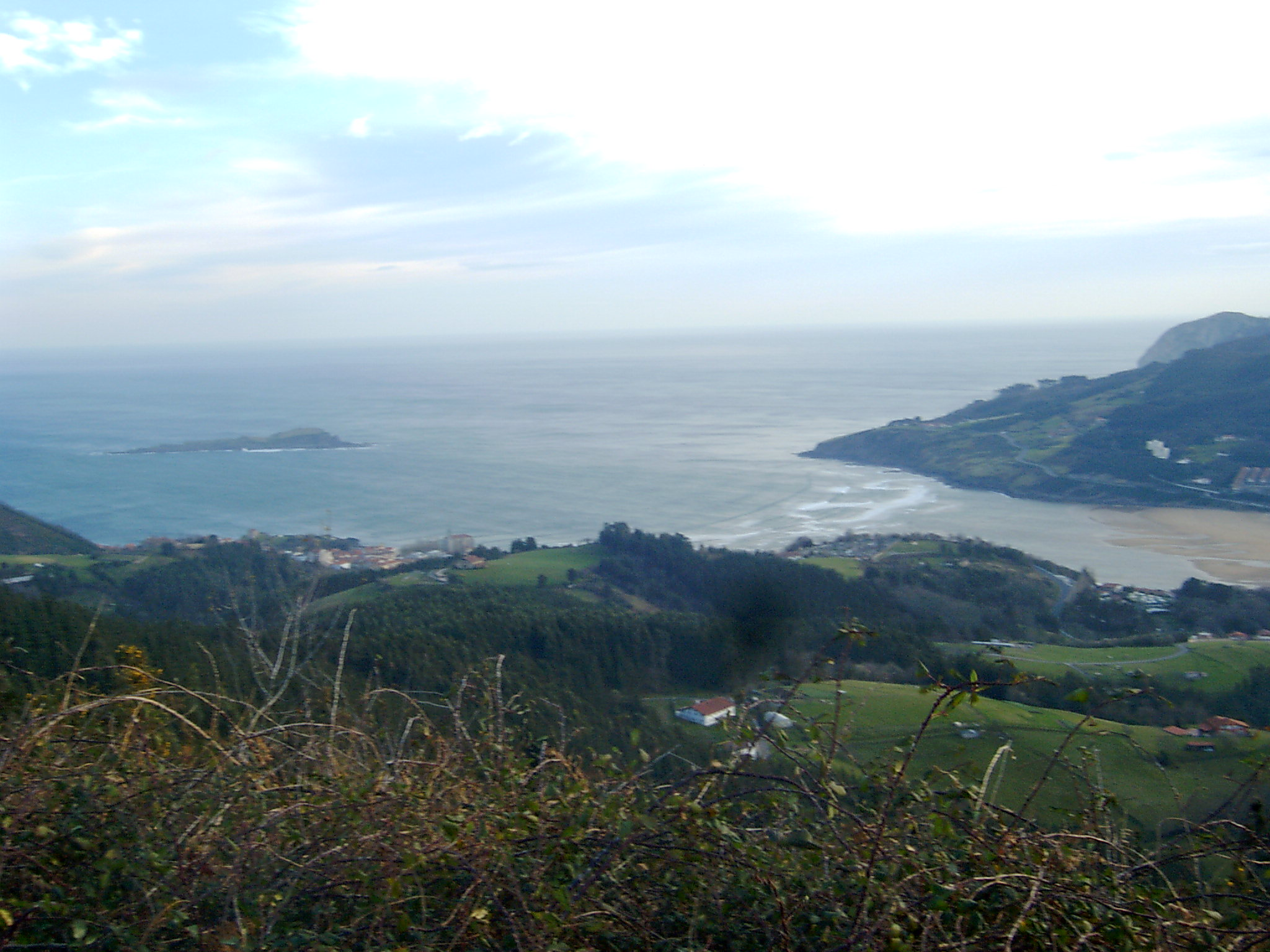 Urdaibai itasadarrako ikuspegia